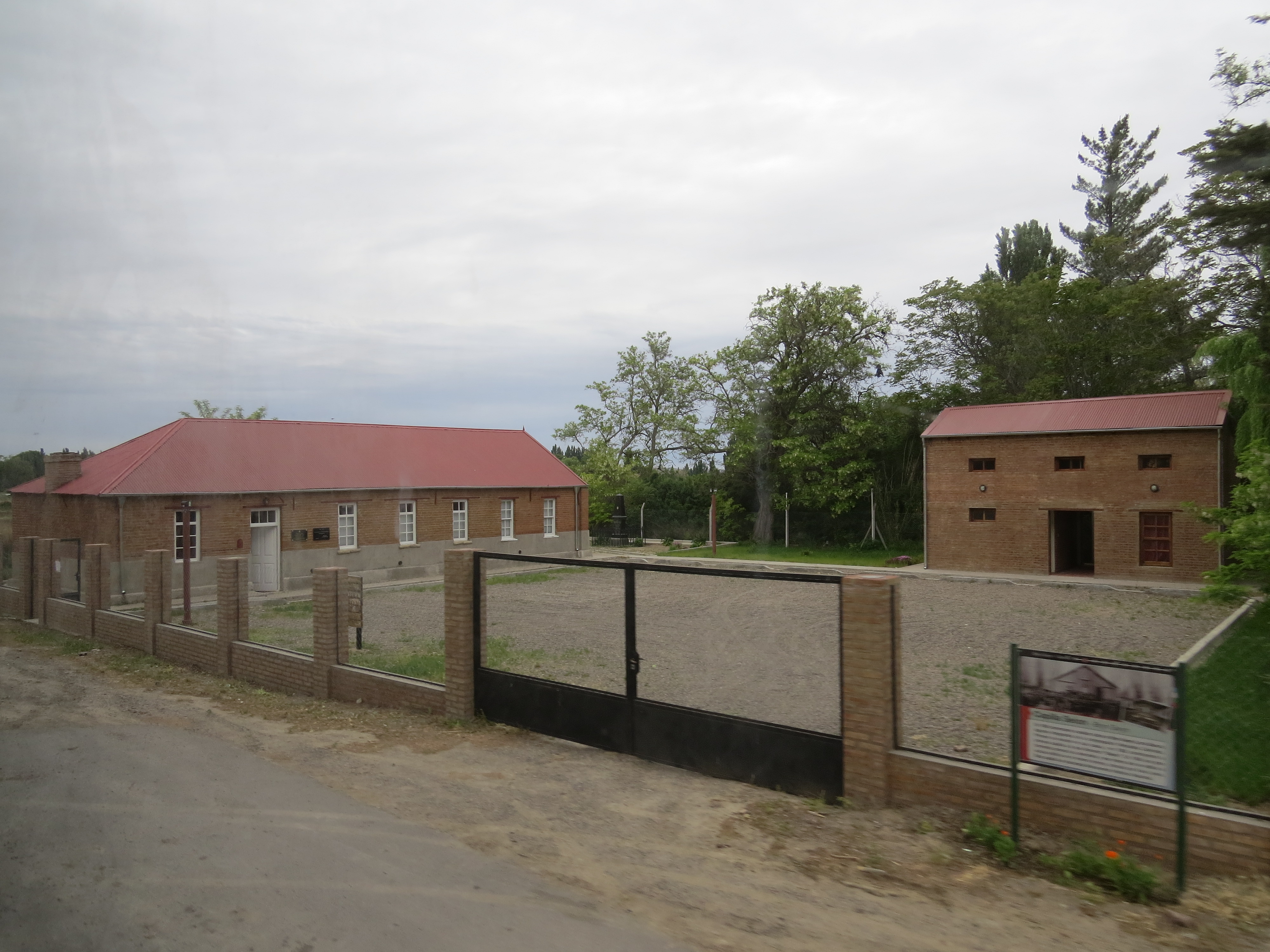 Capilla Seion en Bryn Gwyn